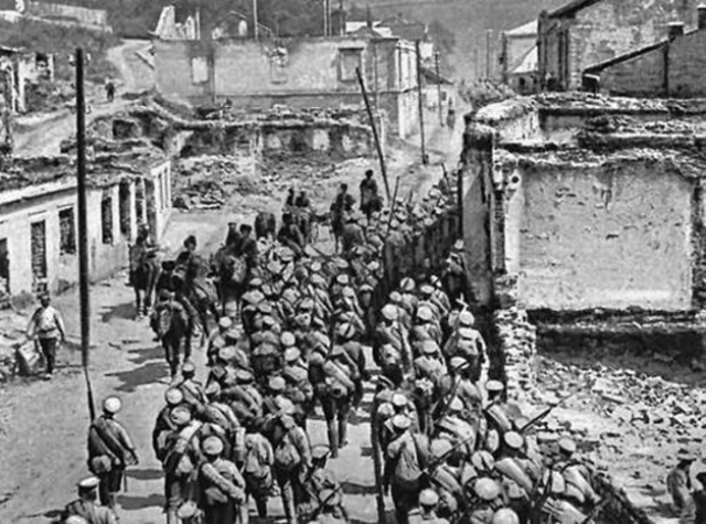 Російська армія вступає до Бучача, 1916 рік